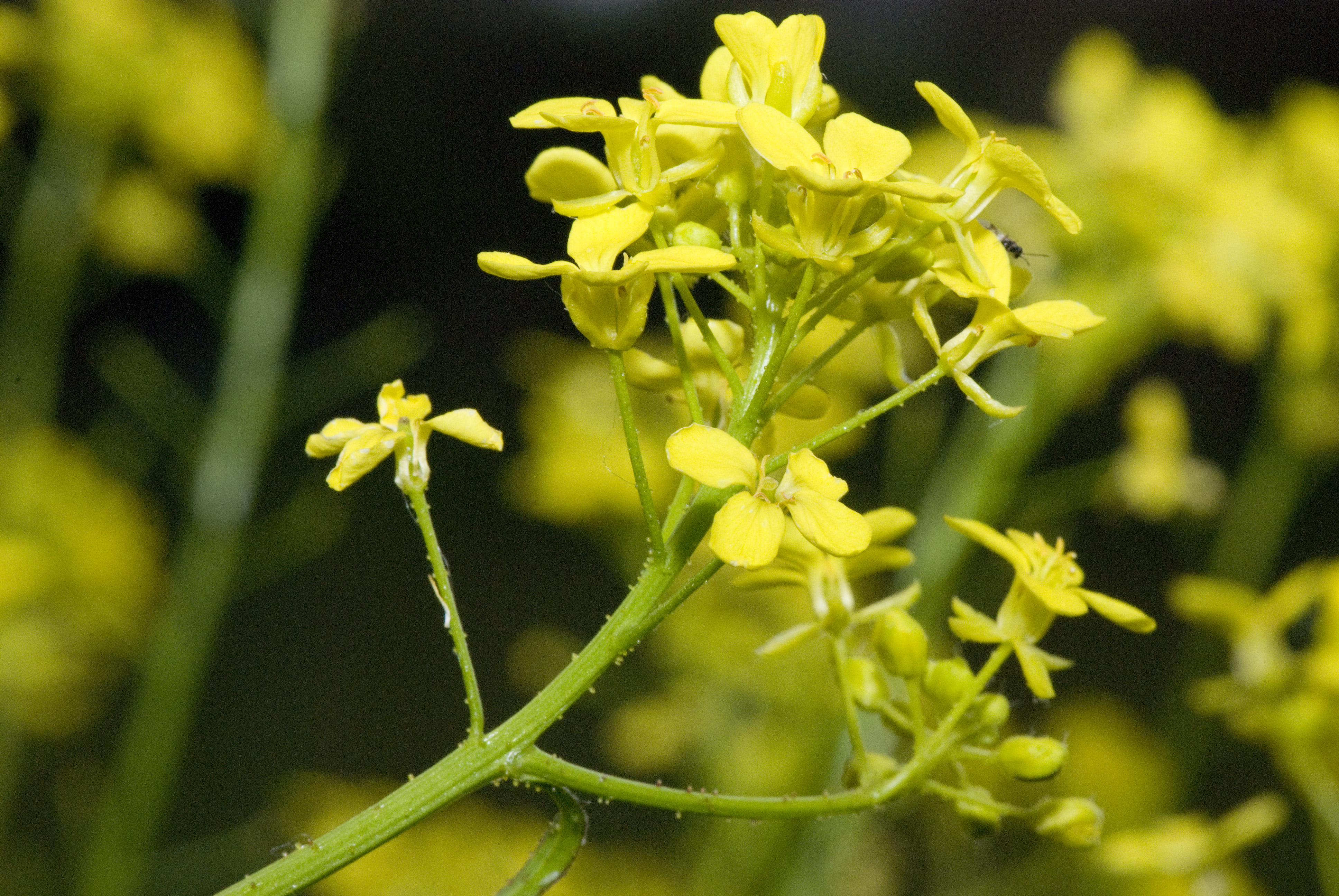 Bunias orientalis Champs Devaugermé, rue folie l'abbé à Château-Thierry (Aisne), France